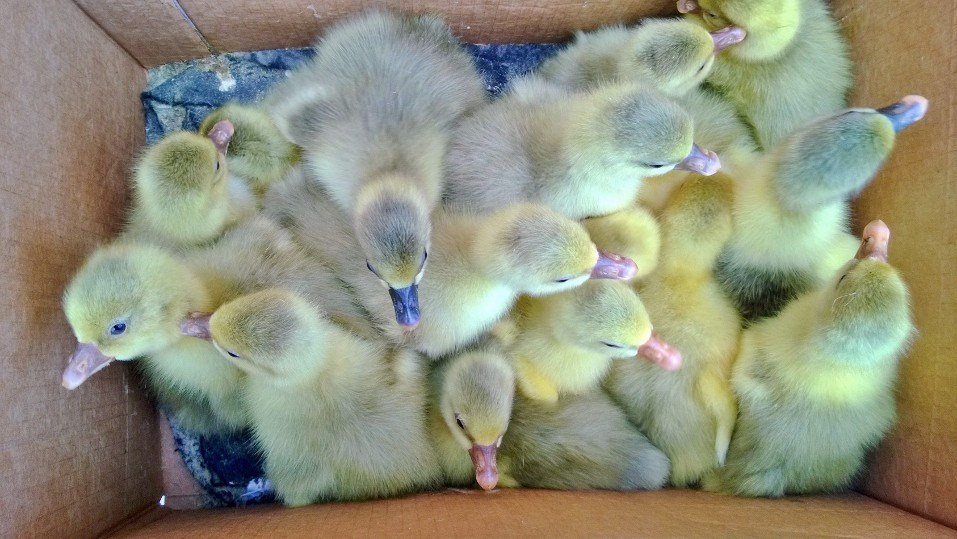 kaz civcivleri